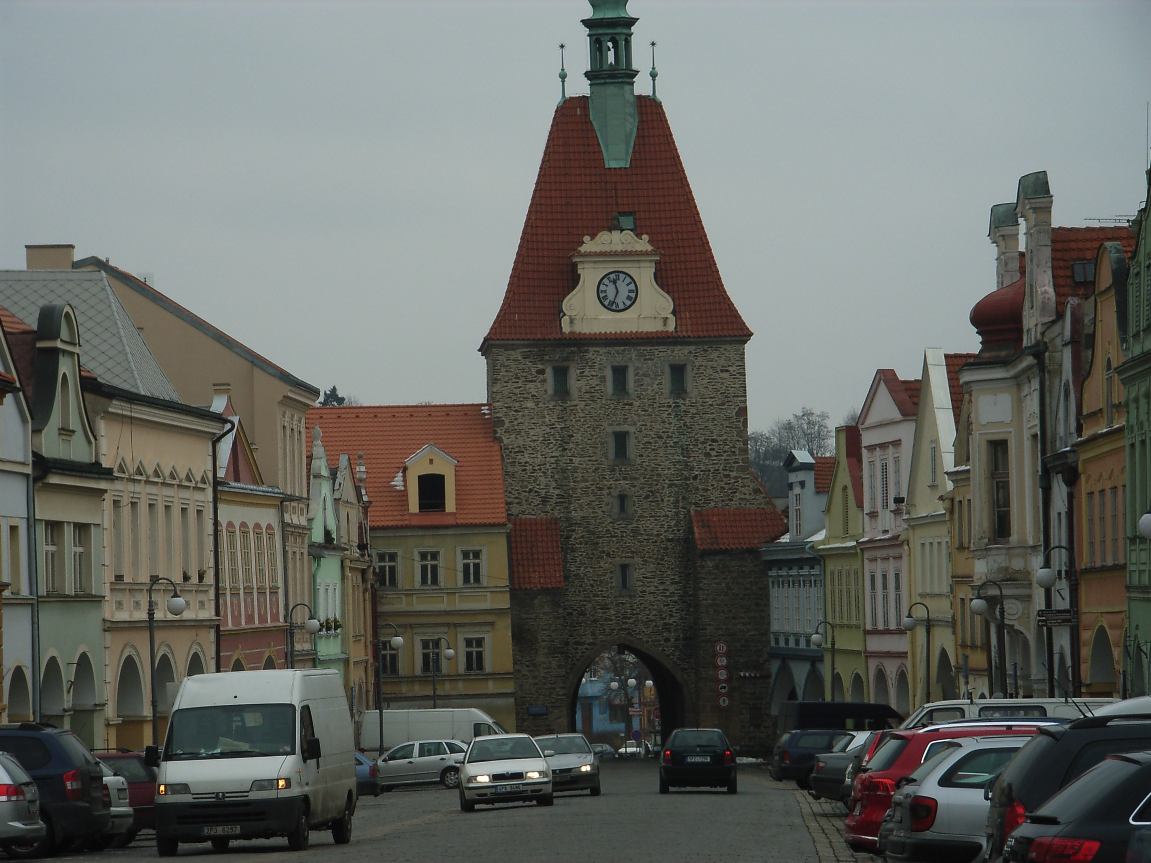 Domažlice östliches Stadttor von innen